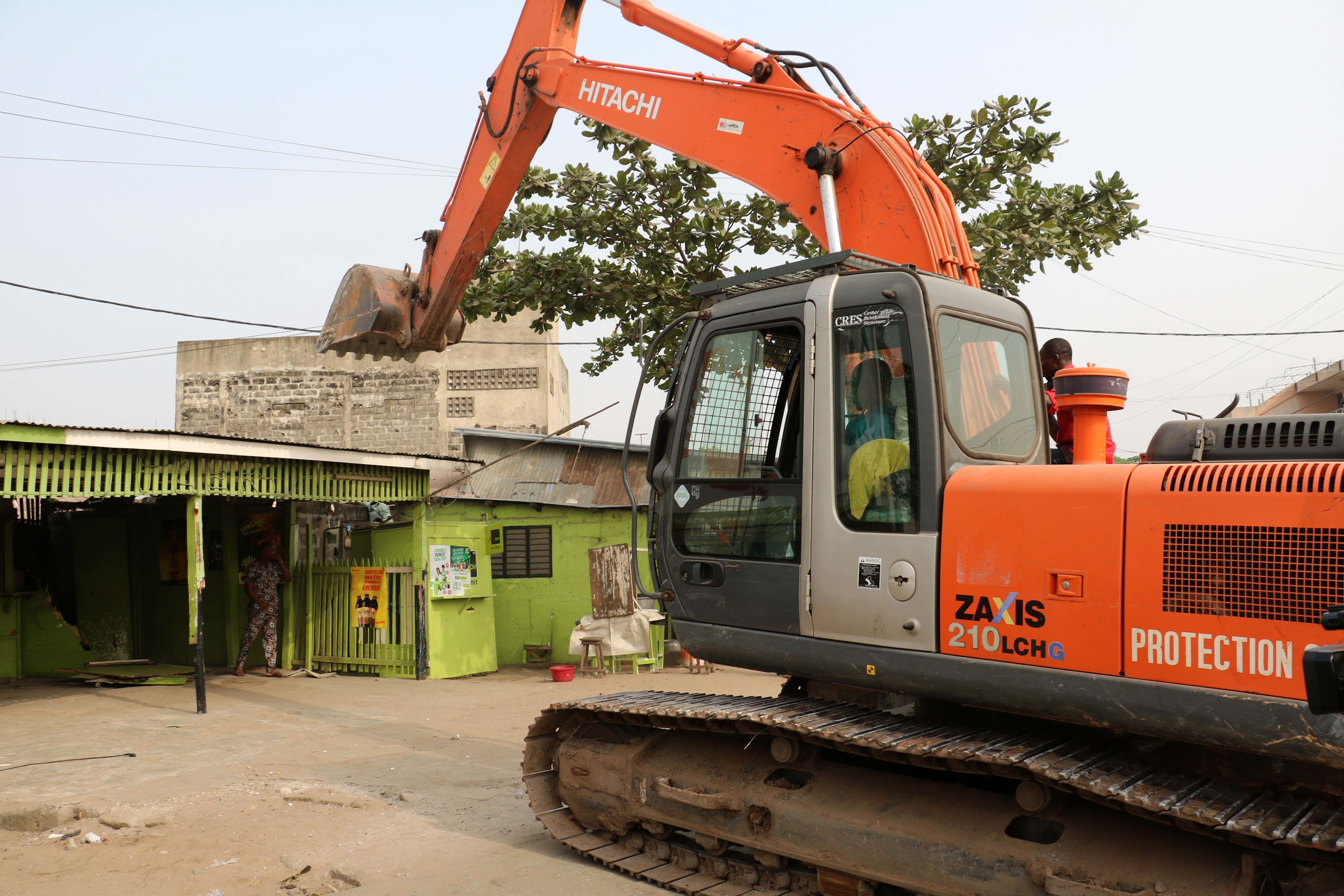 to re-define public areas, degeneration proves to be necessary This is an image with the theme "Africa on the Move or Transport" from: Benin